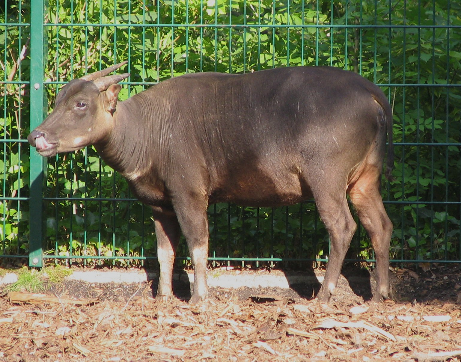 Anoa